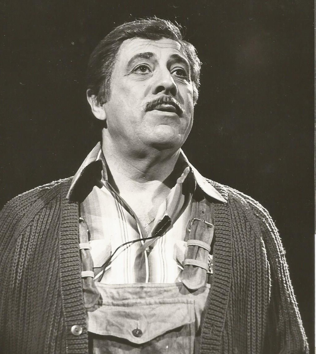 Mucsi Sándor (1926-2006) Amos Hart szerepében a Chicago operettszínházi előadásán, Fővárosi Operettszínház